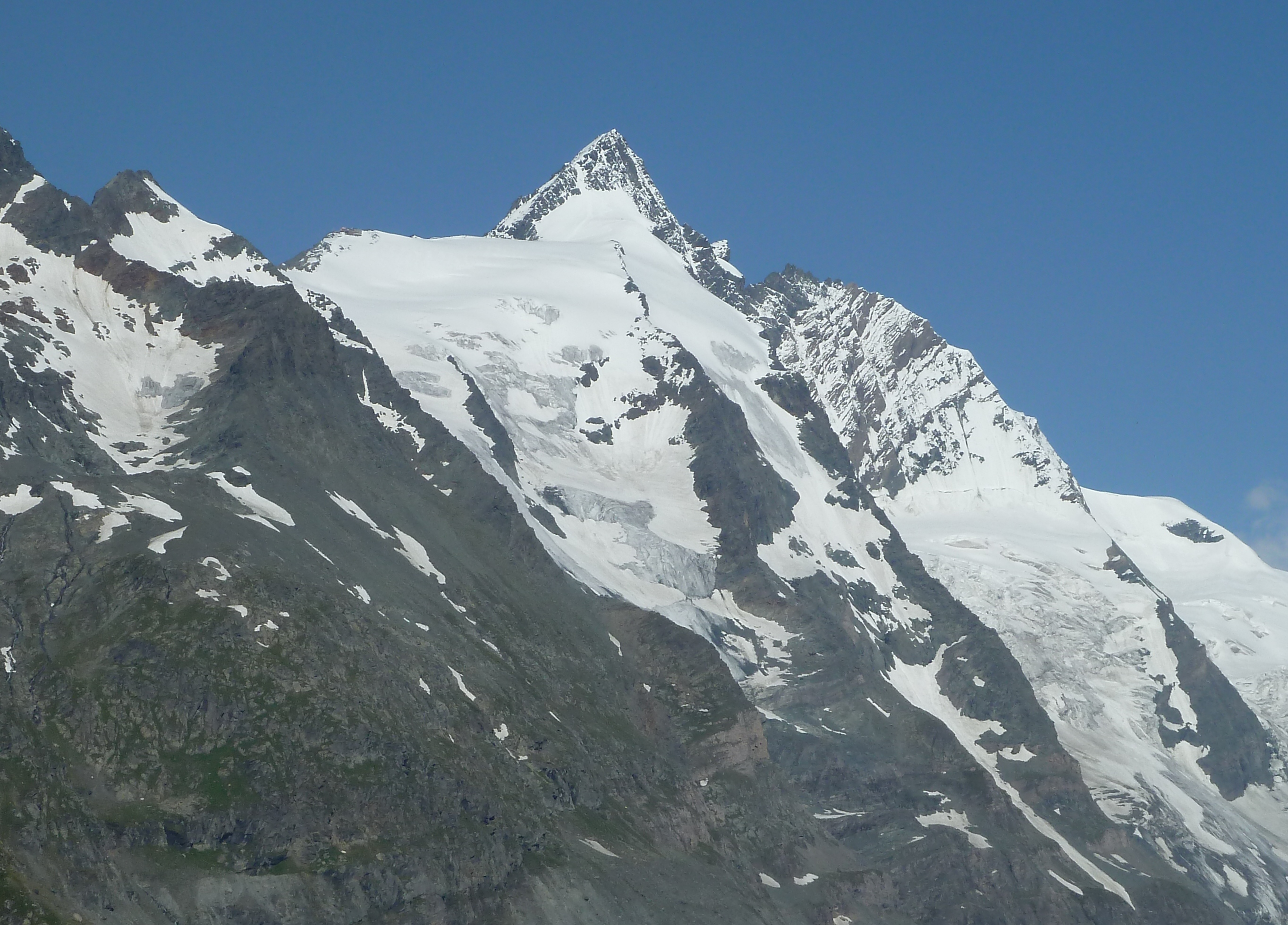 Der Grossglockner im Juli 2011